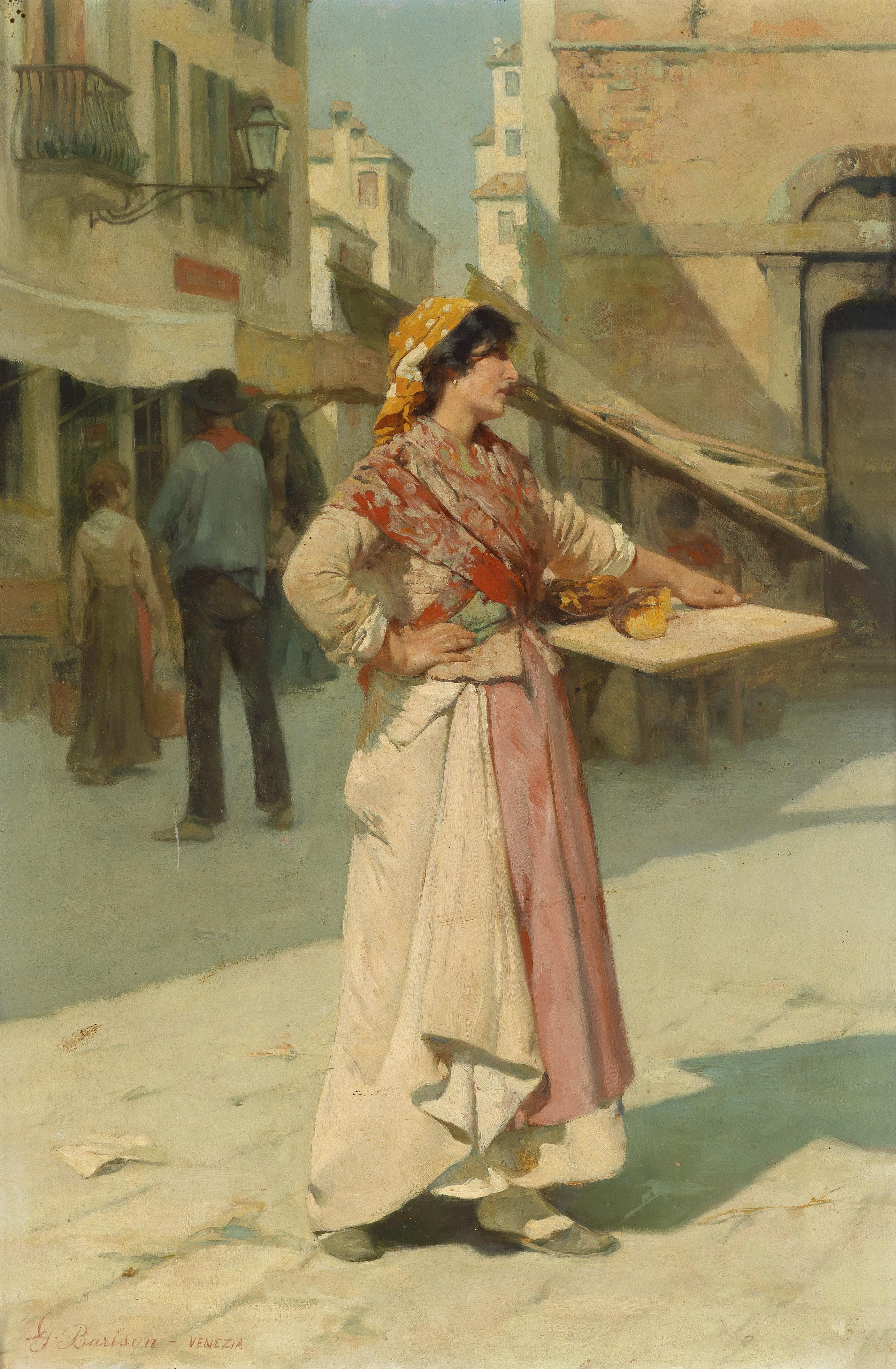 Venezianische Verkäuferin, signiert G. Barison, Venezia, Öl auf Holz, 38,5 x 25,5 cm